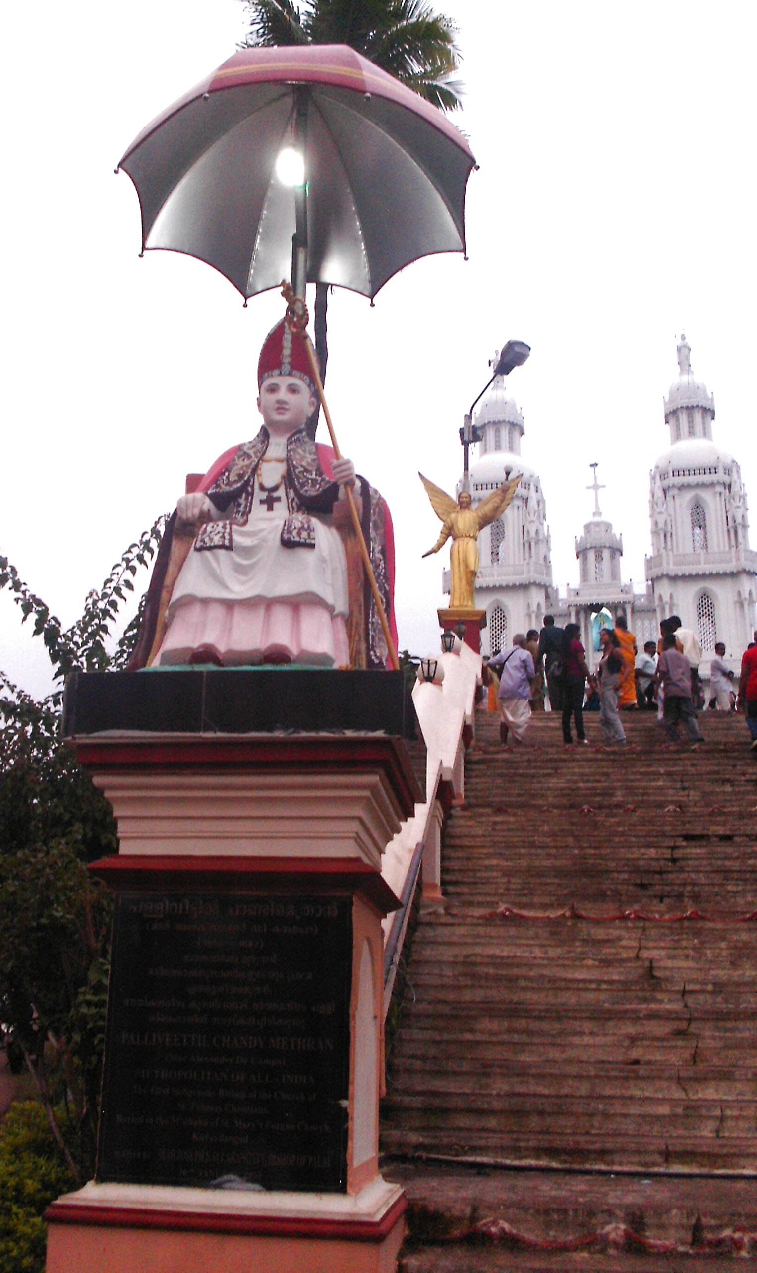 Denkmal von Bischof Alexander de Campo vor seiner Grabeskirche in Kuruvilangad, Kerala